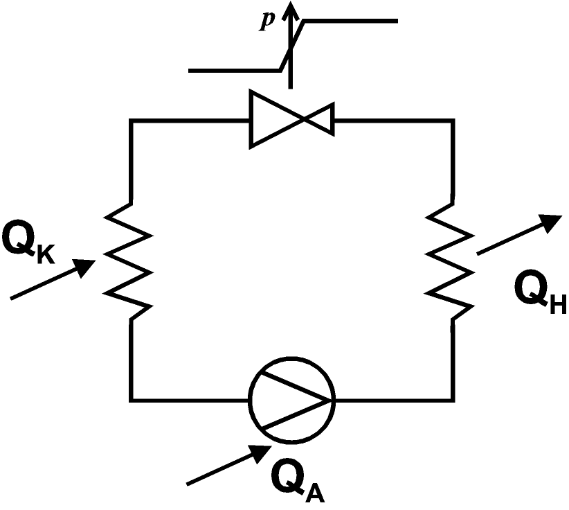 Kaltdampfkältemaschine: Prinzipschaltung